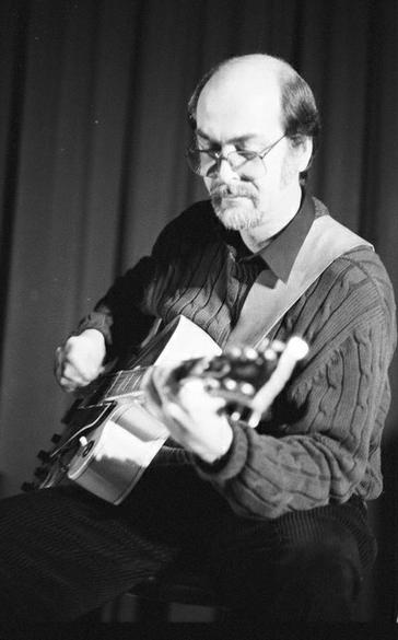 Der Gitarrist Heiner Franz auf dem St. Ingberter Jazzfestival 1990